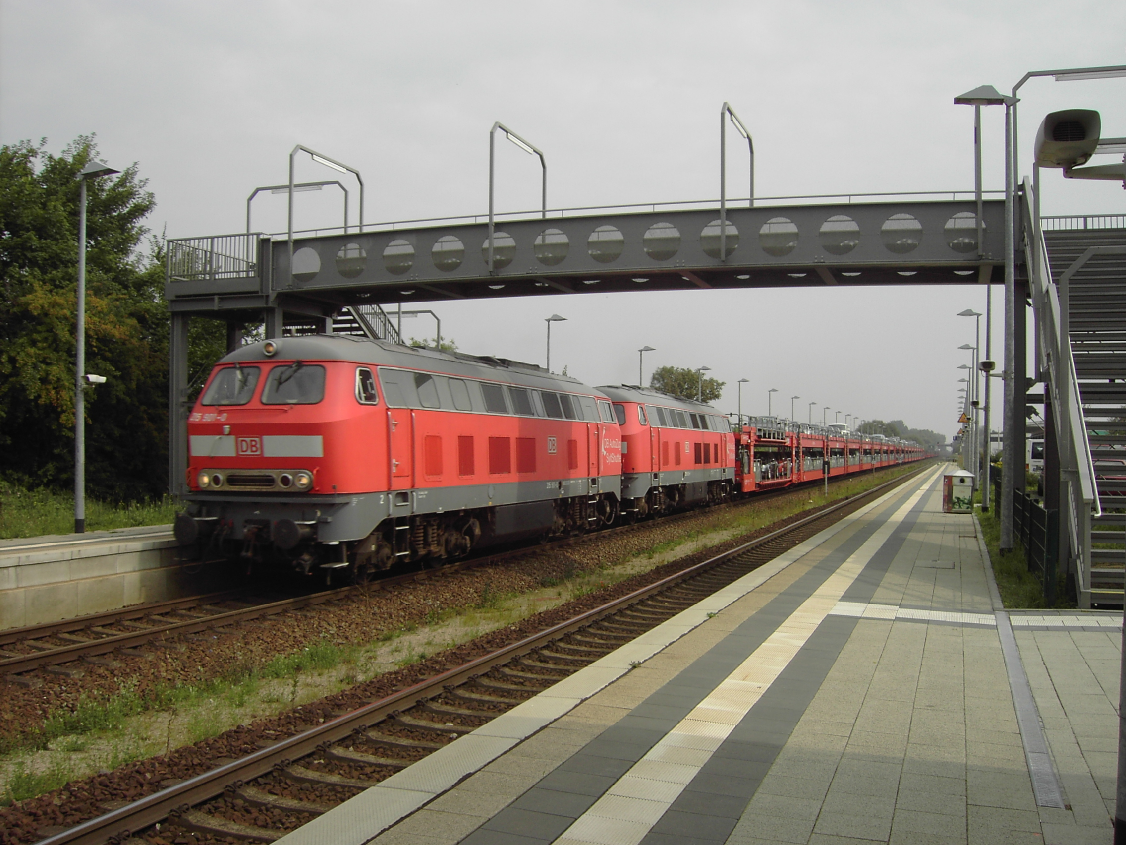 DB AutoZug, Ein SyltShuttle durchfährt den Bahnhof Morsum